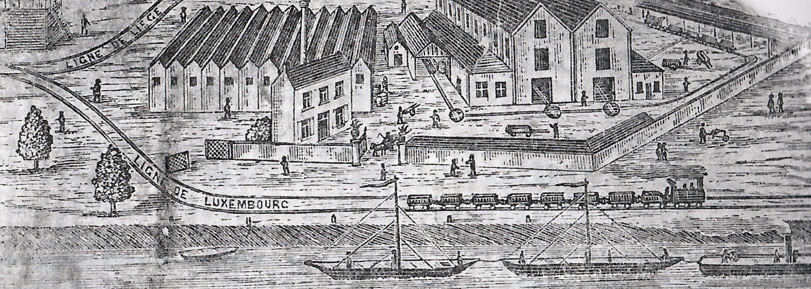 Detail van een carte de visite of vertegenwoordigersbrief(?) van de cementfabriek S.A. Chaux, Ciments & Carreaux de Namur of een voorloper daarvan, gevestigd aan de Maas nabij de Sint-Nicolaaspoort in Namen, België. Eigenaren waren destijds (ca. 1900) Henri en Arthur Regout, zonen van de Maastrichtse ondernemer Petrus (II) Regout. Henri trad na enige tijd terug als directielid. Twee andere familieleden, Eugène (II) en diens zoon Raymond, waren vertegenwoordigers.